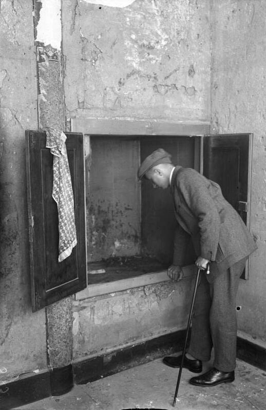 Zu dem großen Prozess den siebenundzwanzigfachen Mörder Haarmann in Hannover, wozu hundertundneunzig Zeugen geladen sind. Die Totenkammer, in welcher Haarmann seine umgebrachten Opfer bis zum andern Tage aufbewahrte. Man sieht deutlich im Bilde die Blutspuren.